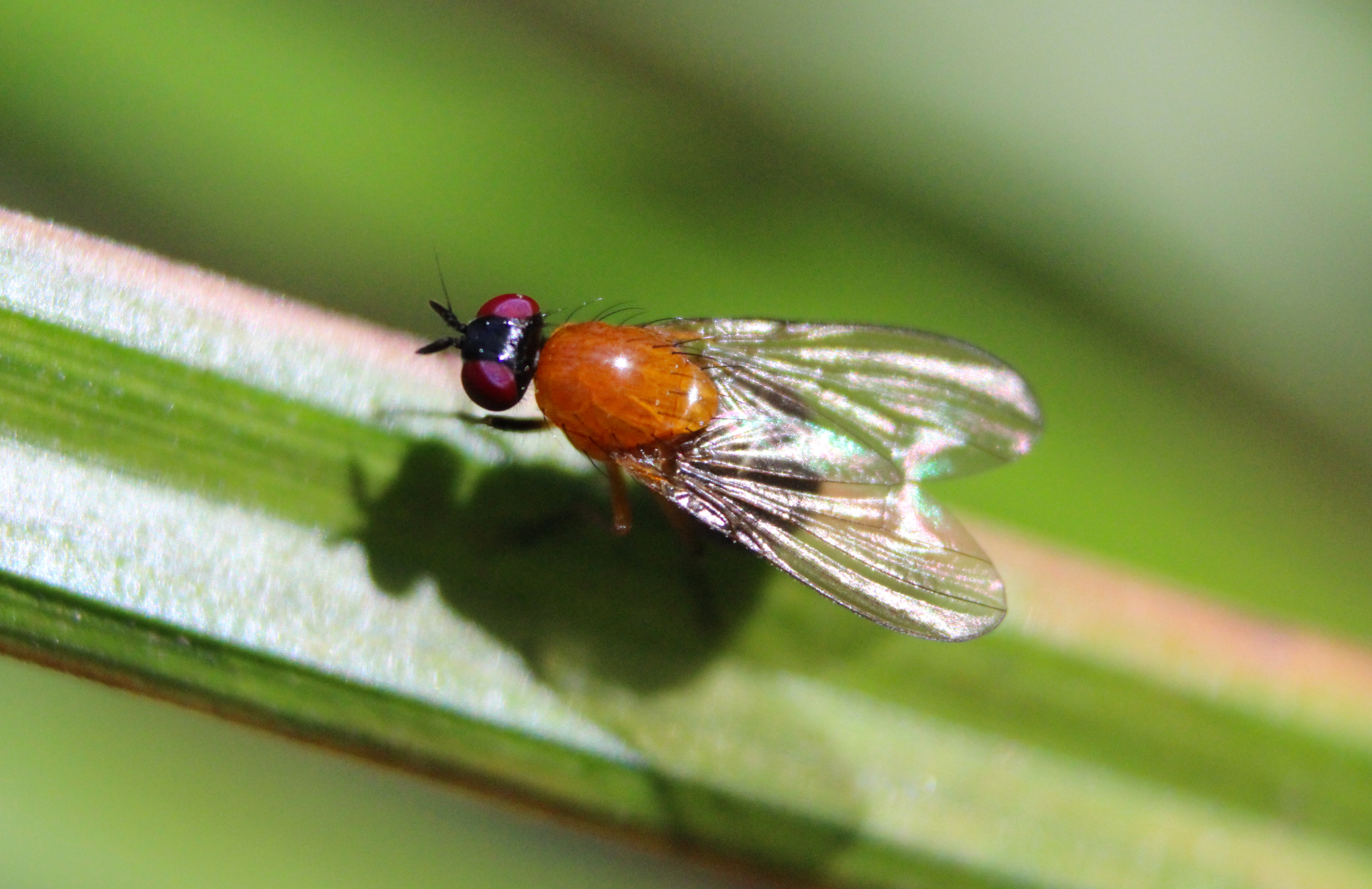 Orange-blue lauxaniid fly